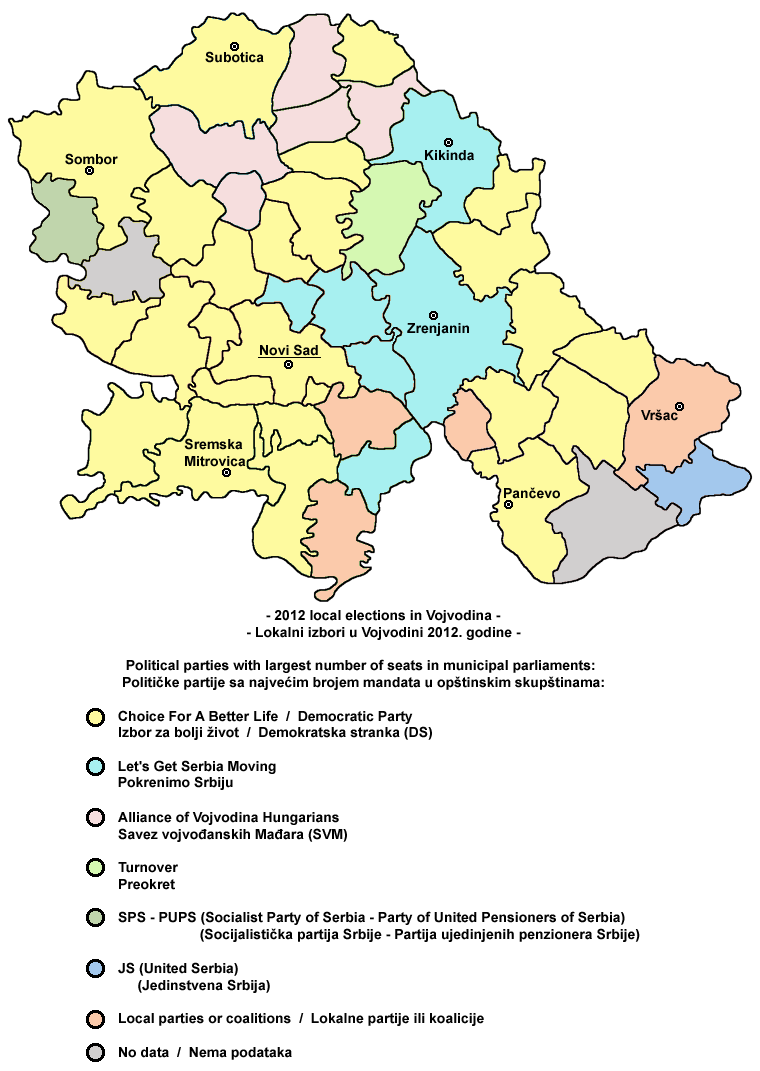 Election map of Vojvodina - results of 2012 local elections. Izborna mapa Vojvodine - rezultati lokalnih izbora iz 2012. godine.